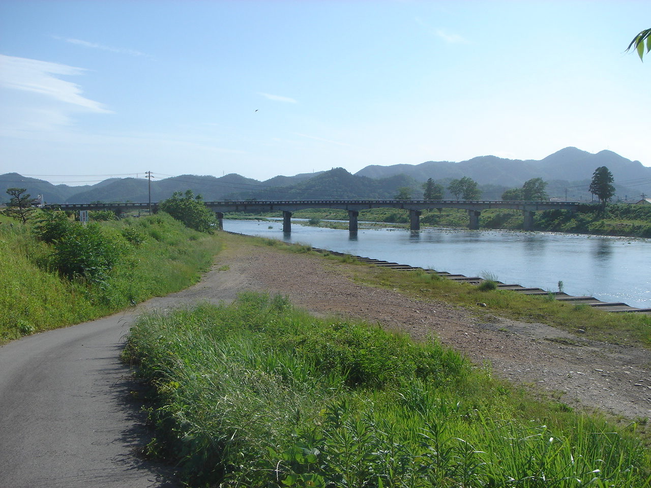 Hodojima Bashi(保戸島橋),Seki,Gifu,Japan(岐阜県関市)で撮影。川は今川(長良川の支流)、上流にw:ja:今川橋がある。